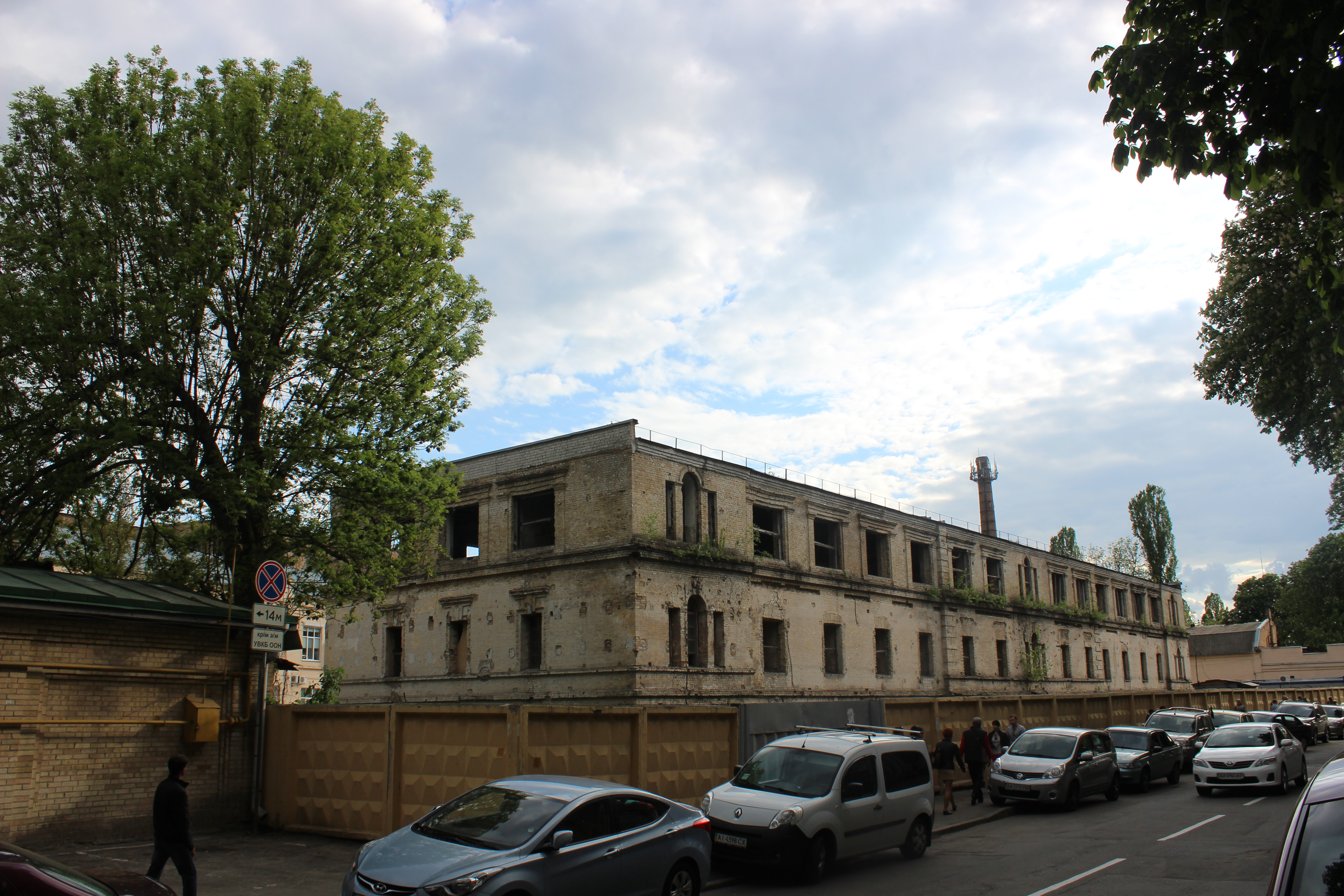 Казарми військово-сирітського відділення, в яких містився 3-й авіаційний парк, де у 1912-14 рр. служив Нестеров П., видатний льотчик (Стара Києво- Печерська фортеця (цитадель),, Київ, Цитадельна вул., 3